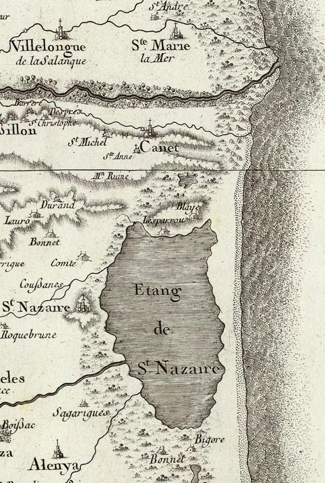 Canet-en-Roussillon et ses environs sur la carte de Cassini de 1750